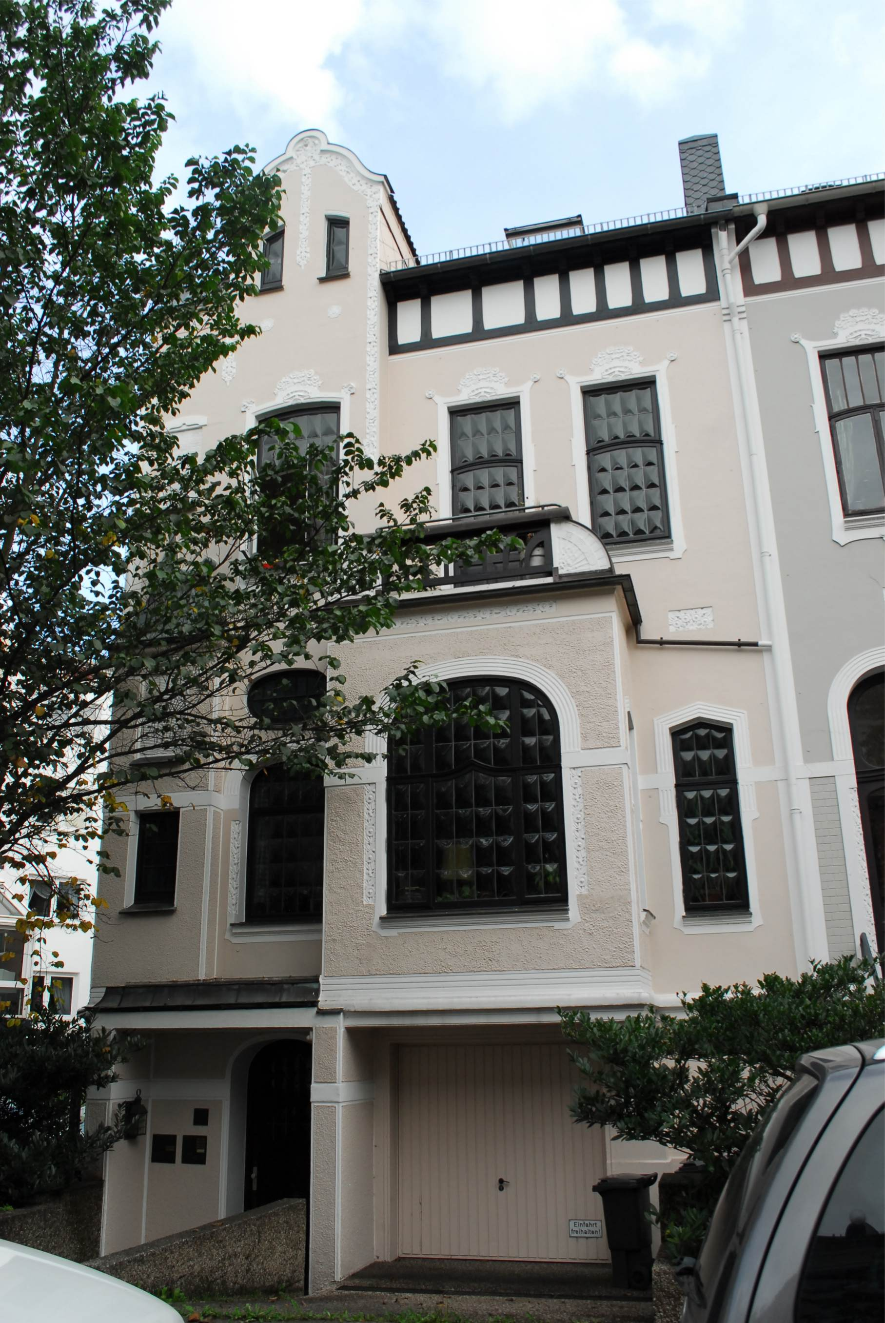 Wohnhaus in Bremen, Franz-Liszt-Straße 2A.Das abgebildete Objekt ist ein geschütztes Kulturdenkmal in der Freien Hansestadt Bremen, mit der Nr. 0413 beim Landesamt für Denkmalpflege registriert.